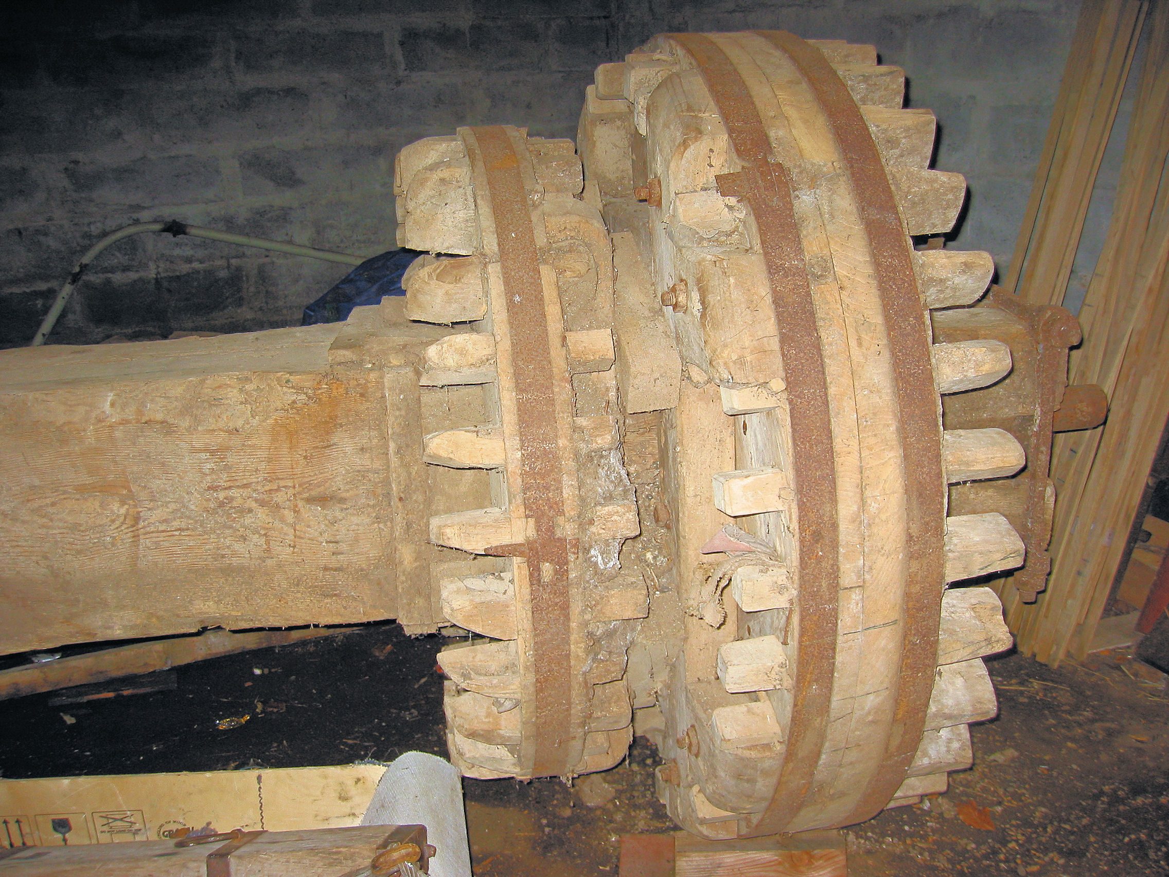 Bonkelaar met luibonkelaar van de Concordia molen te Ede